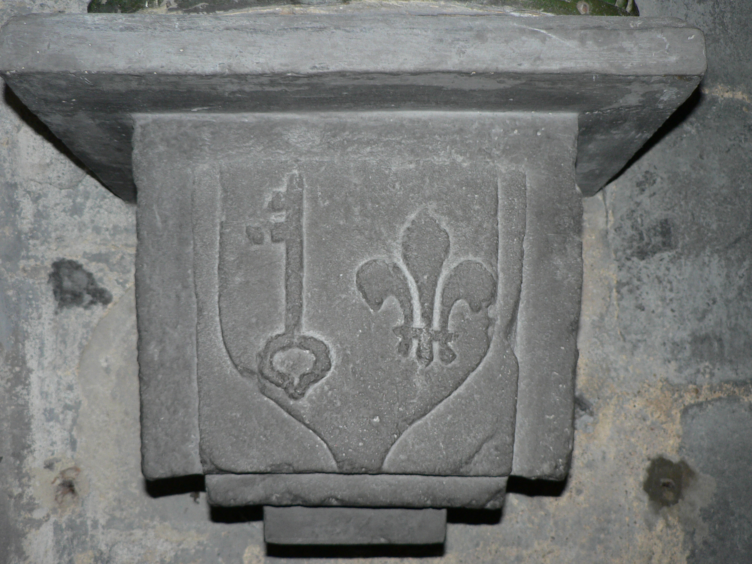 Console de statue (pierre de Volvic) aux armes de l'abbaye de Mozac (clef de saint Pierre et fleur de lys) dans le collatéral sud de ladite église.